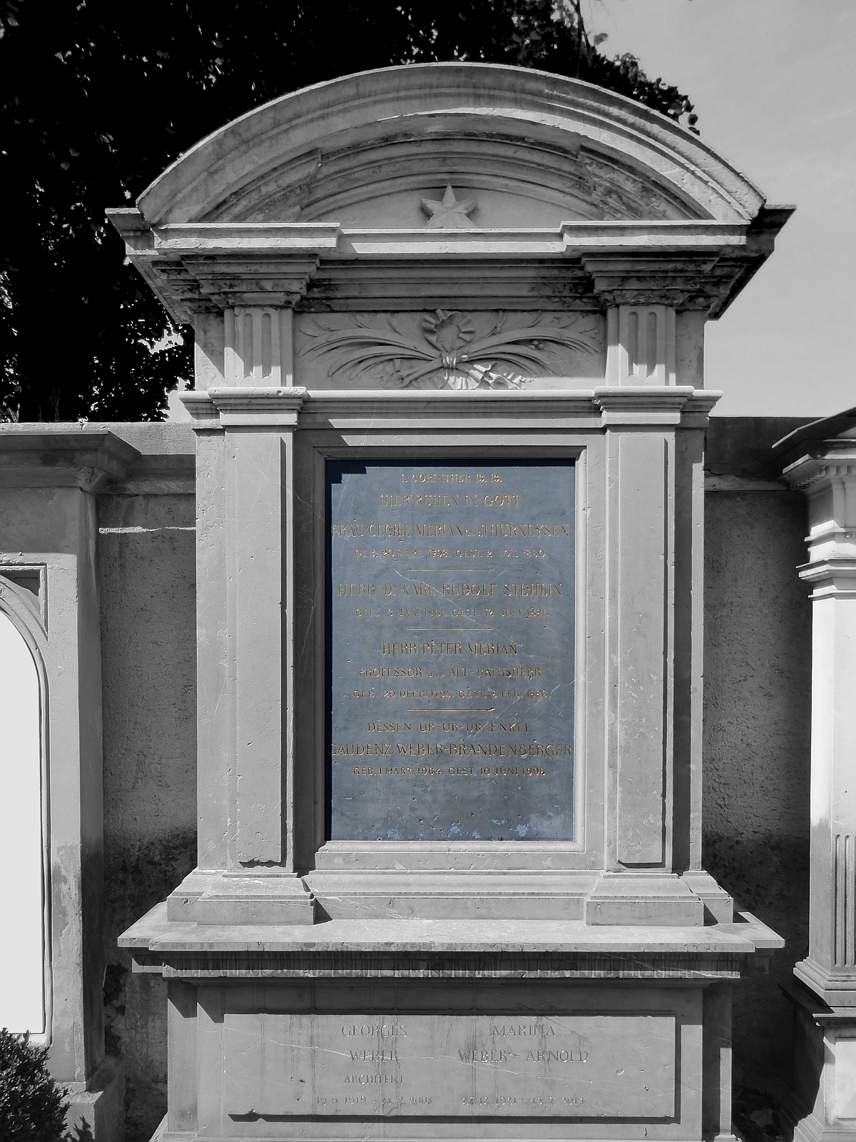 Familengrab, Friedhof Wolfgottesacker, Basel